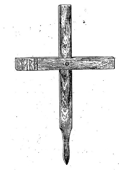 Croix en bois retrouvée à Herjolfsnes et portant une inscription runique signifiant Maria.